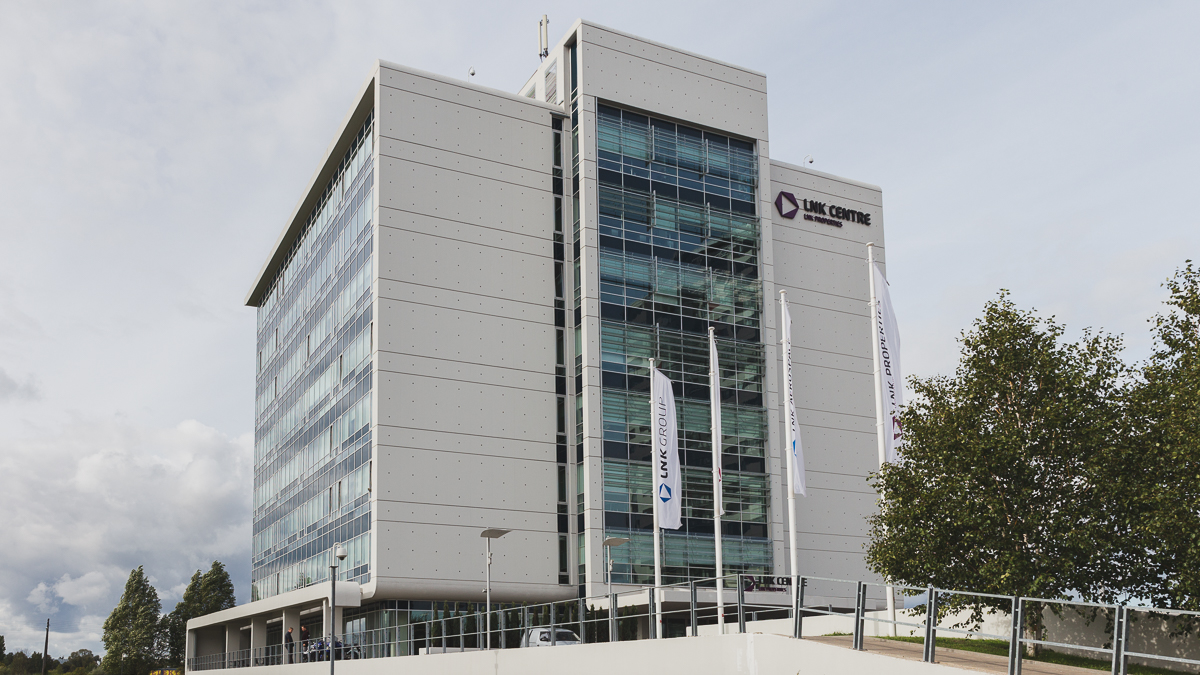 LNK Centre